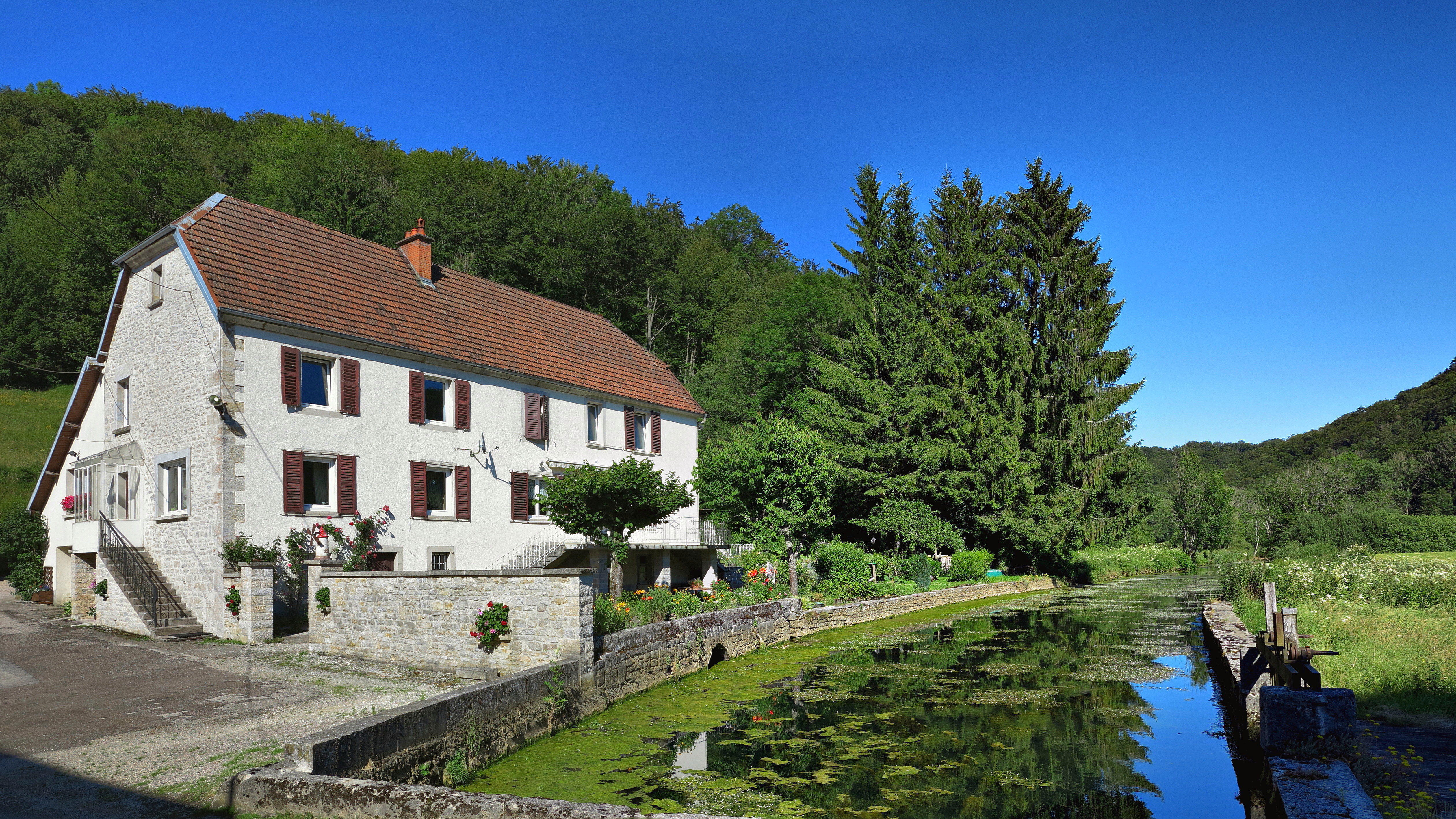 L'Audeux au moulin de Creuse